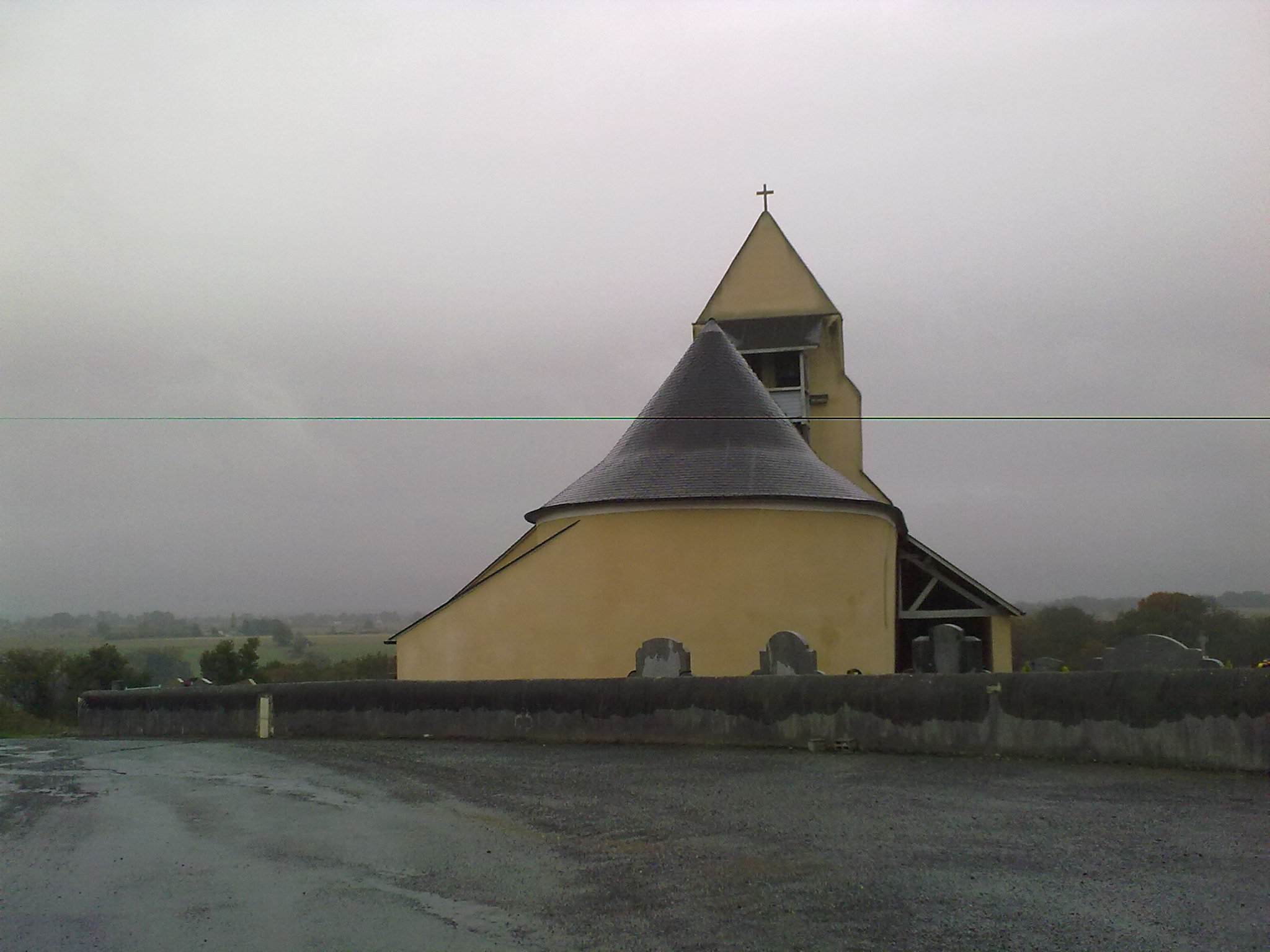 Coslédaà-Lube-Boast le 14 novembre 2010.